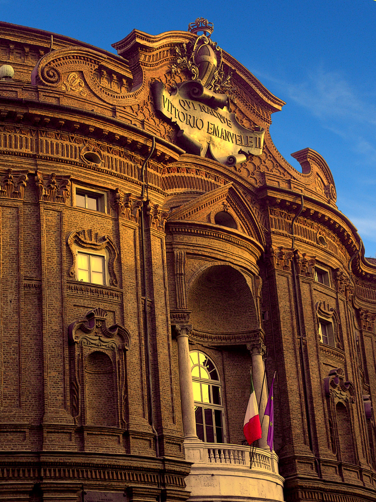 Fronte di Palazzo Carignano di Torino al tramonto. Leggero retouch per esaltare un croma e bordi da stampa anastatica.